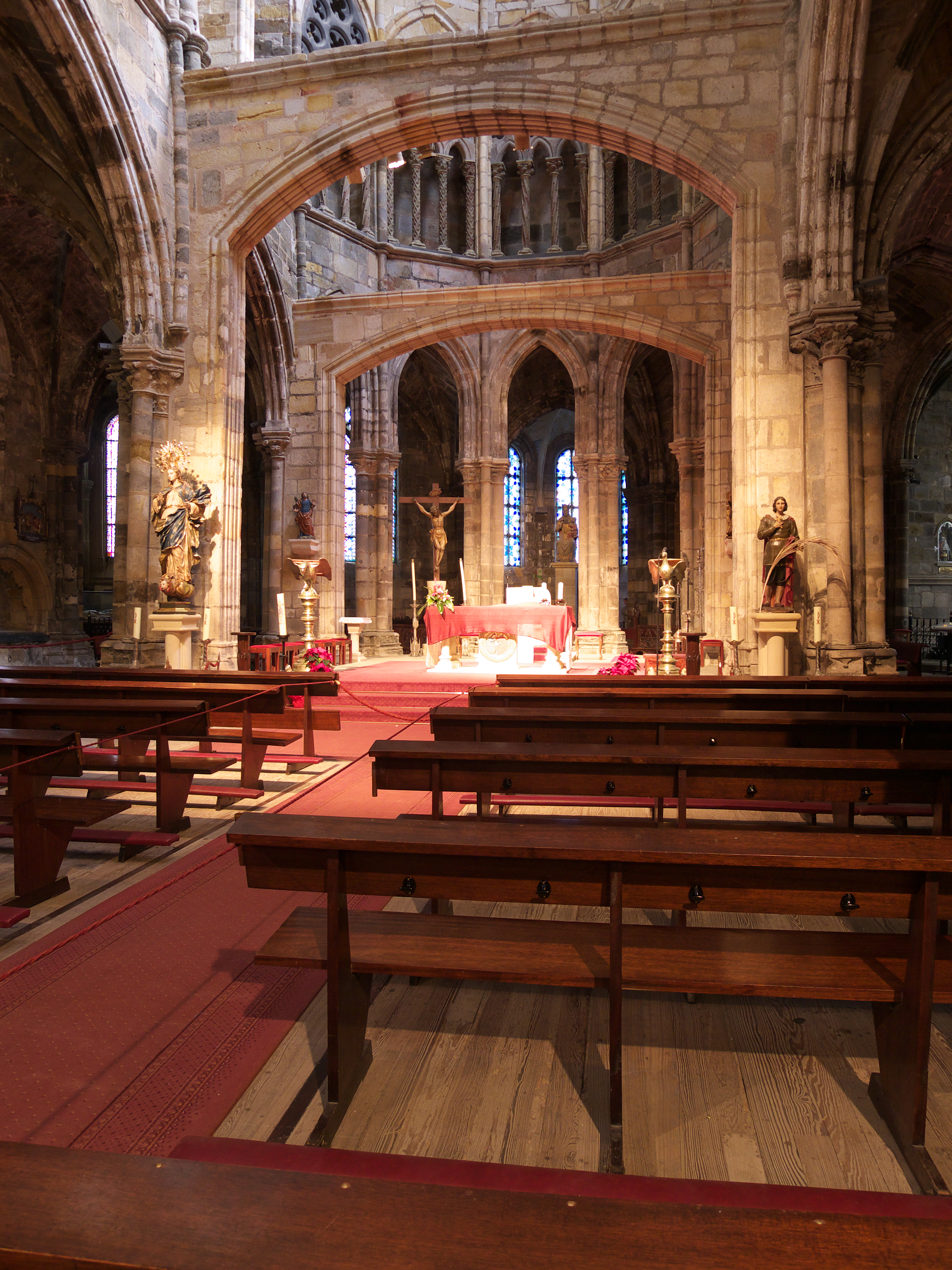 Interior de la iglesia gótica de mediados del siglo XIII.